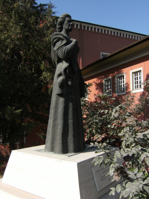 Ankara Ankara Opera Sahnesi önünde bulunan Leyla Gencer Anıtı